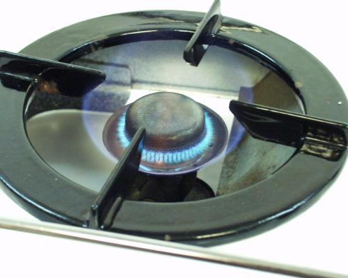 Brenner eines Petroleum-Vergaser-Kochers von Geniol